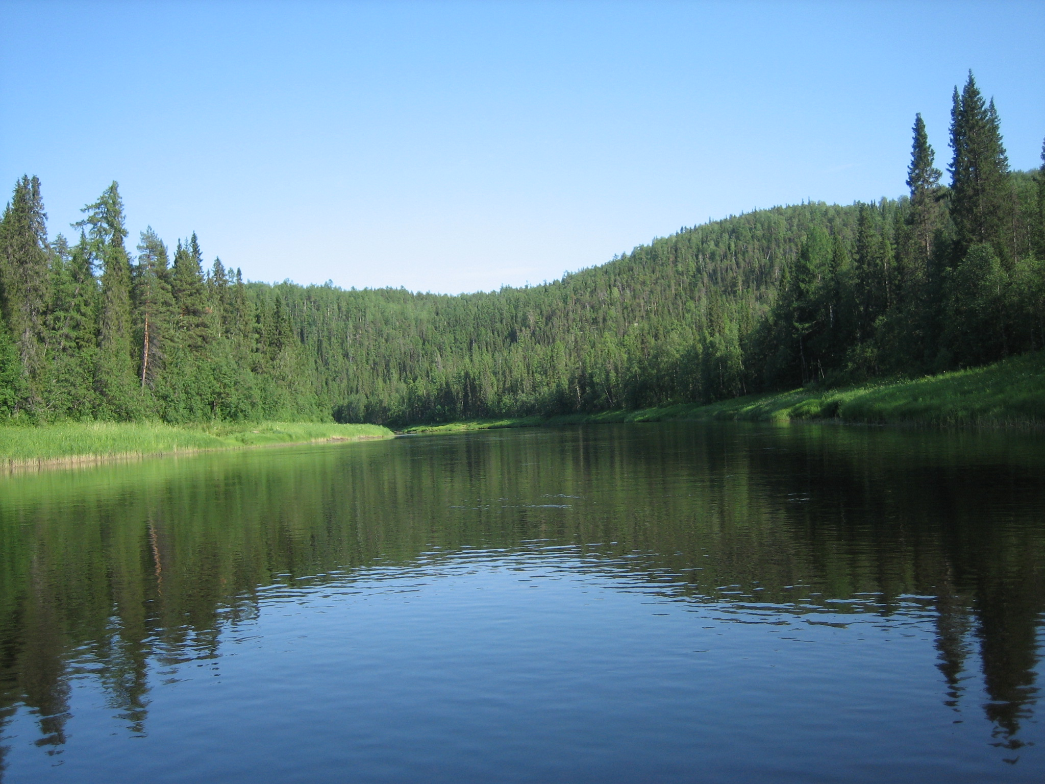 Река Пижма: Левый приток р.Печоры, от истока до дер.Верховская, Усть-Цилемский район, республика Коми This image is related to the protected area of Russia number 1110450